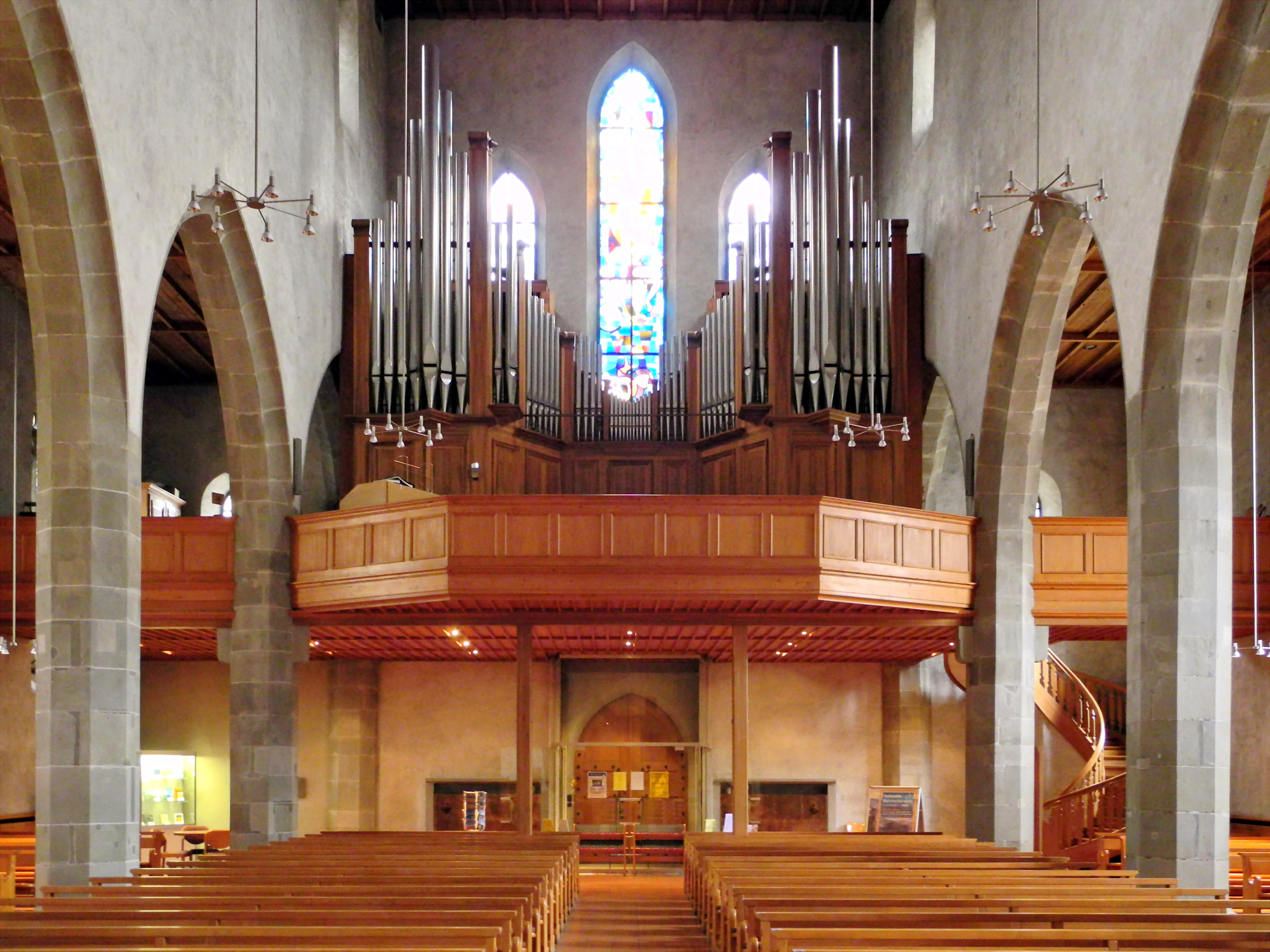 Augustinerkirche, Münzplatz in Zürich (Switzerland)